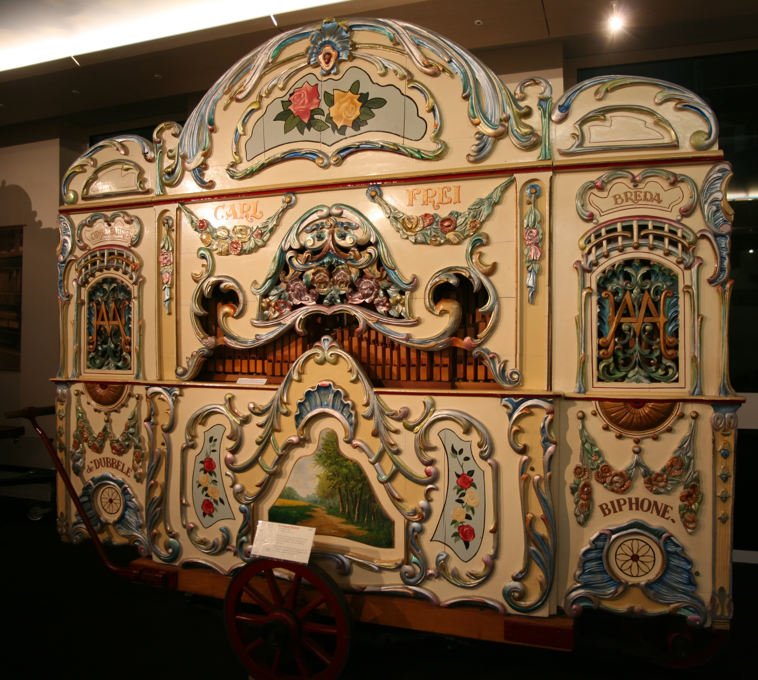 museum speelklok tot pierement (212)